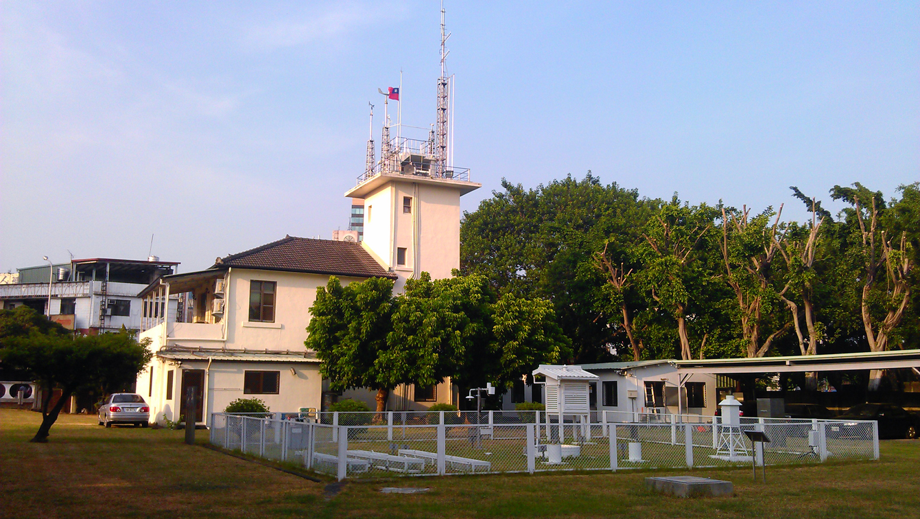 臺中市北區臺中公園內的中央氣象局台中氣象站。